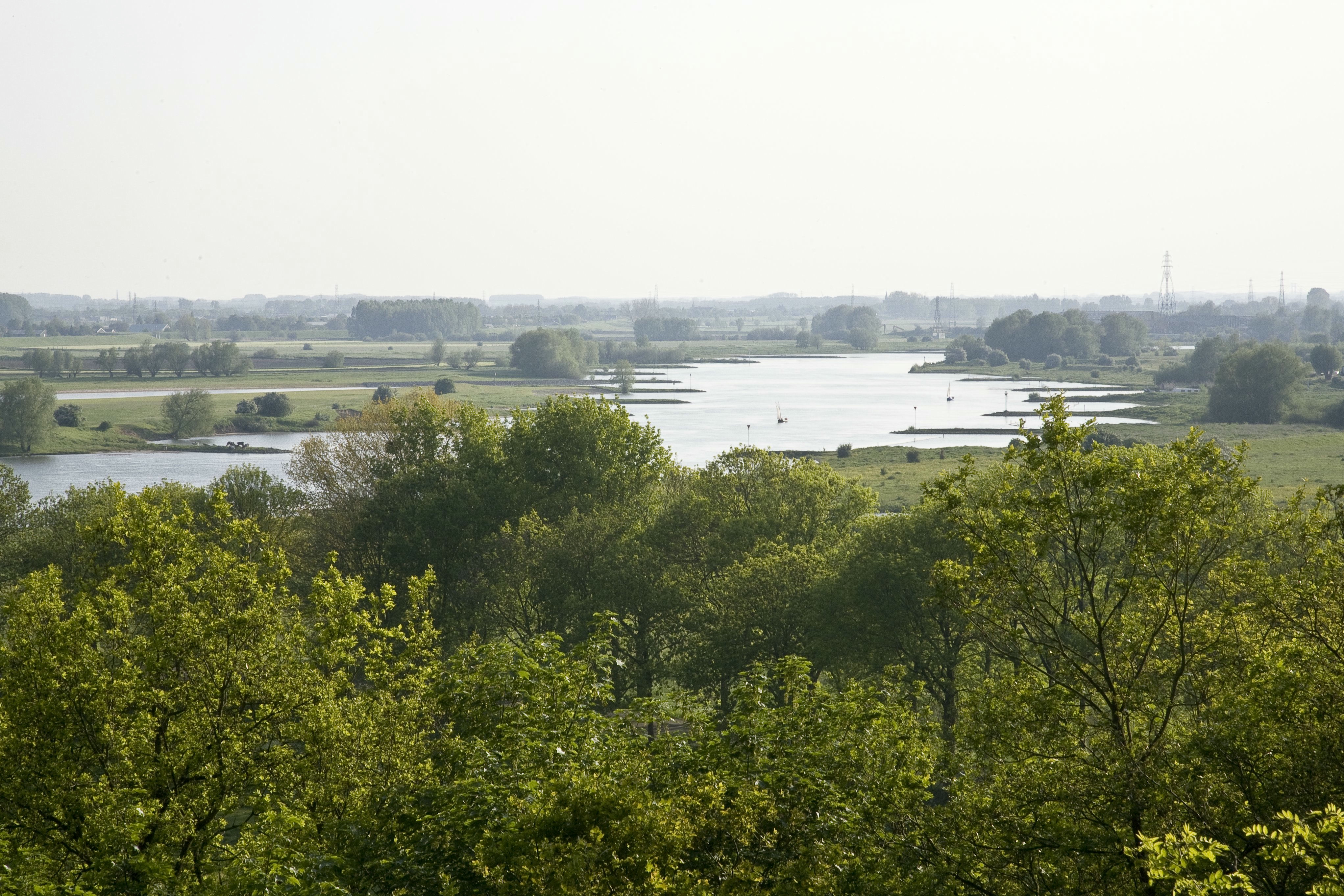 Arboretum Belmonte: Uitzicht over de Rijn